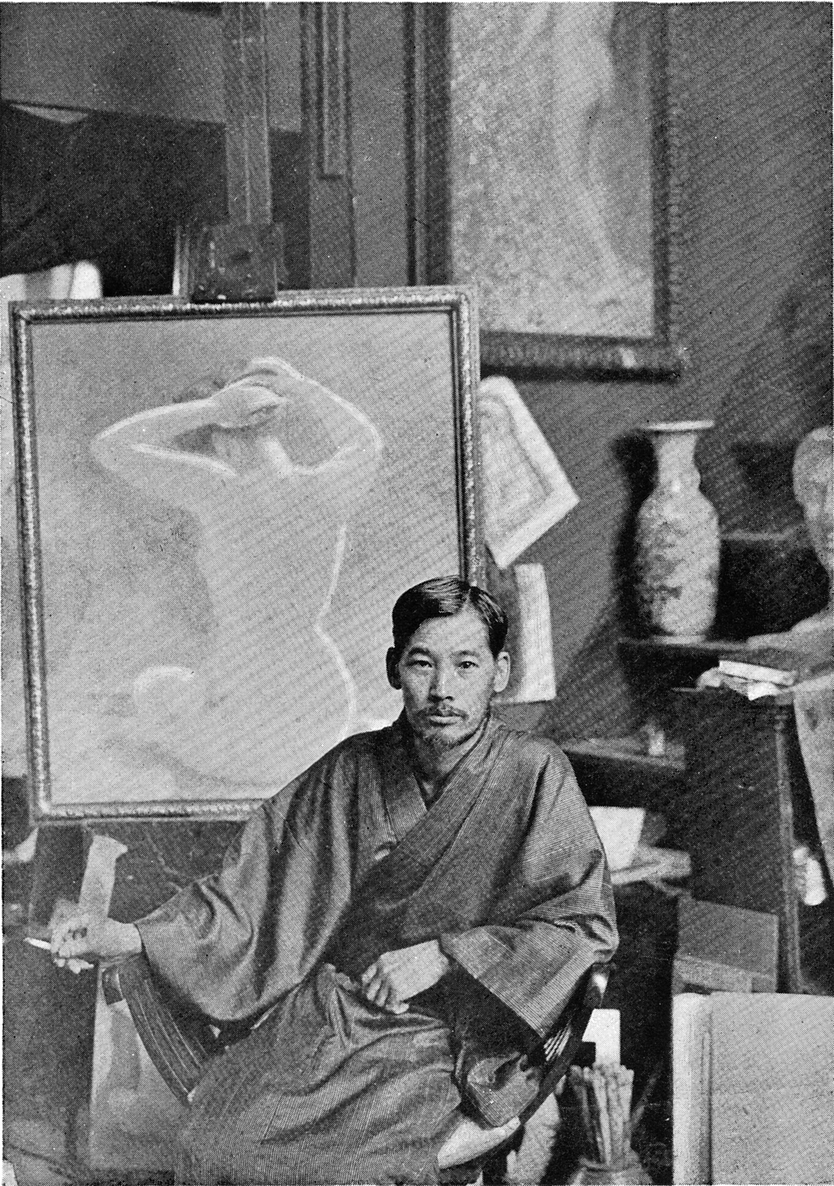 a Japanese painter, 岡田三郎助 (Okada Saburosuke)